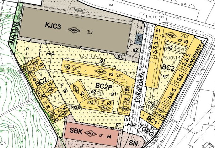 Detaljplan (Dp 2010-21655) för del av fastigheten Sjövik 5, Liljeholmen (utsnitt)